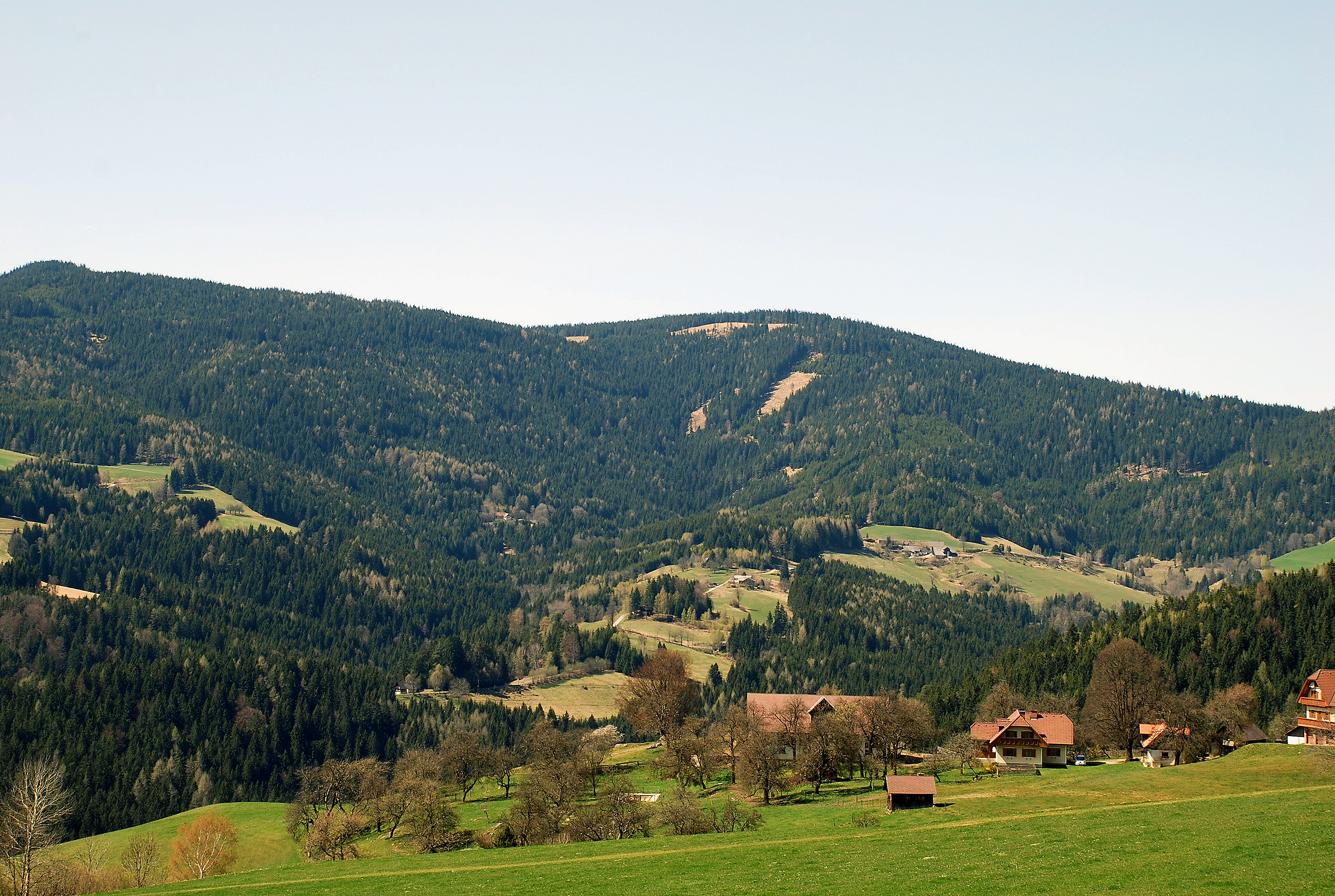 Klosterwinkel, Gemeinde Kloster, Rücken zwischen Klosterbach (li) und Oberlauf des Wildbaches (re)